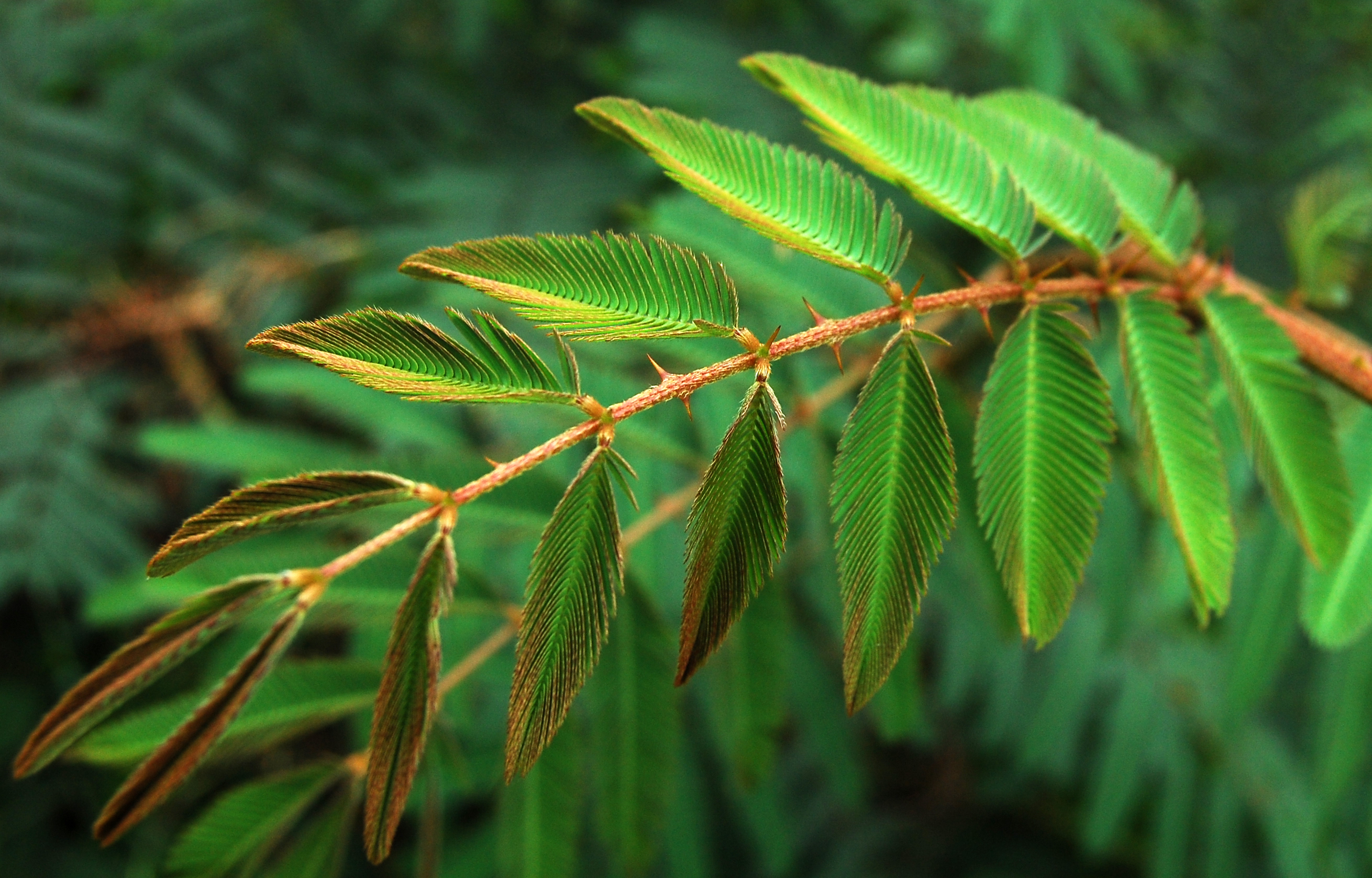 Mimosa pudica